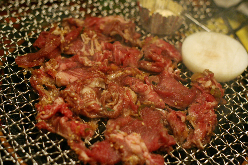 Korean barbeque